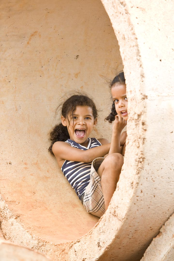 Brazil